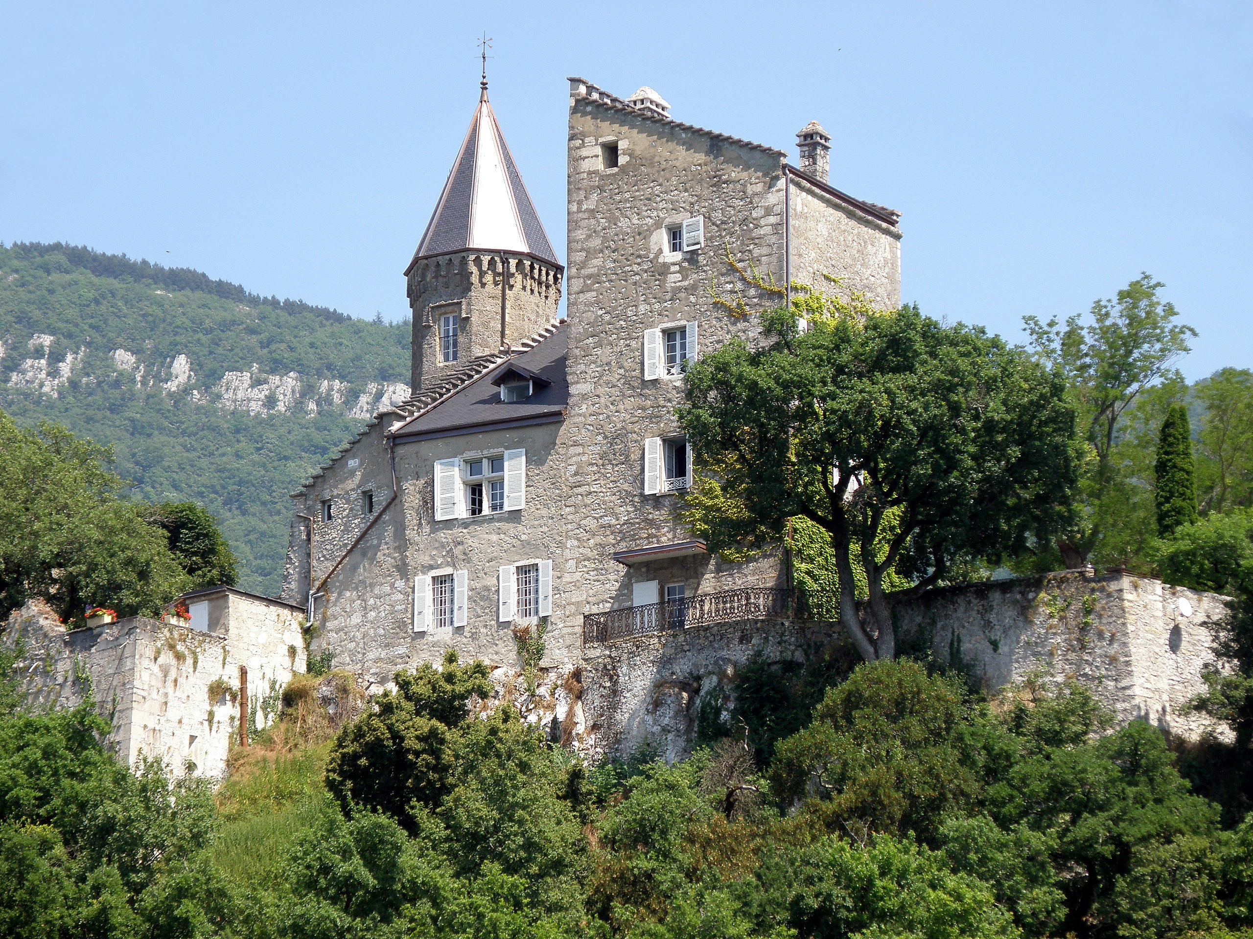 Chindrieux, comm. du département de la Savoie (région Rhône-Alpes, France). Le château de Châtillon, dans le village homonyme, au bord du lac du Bourget.